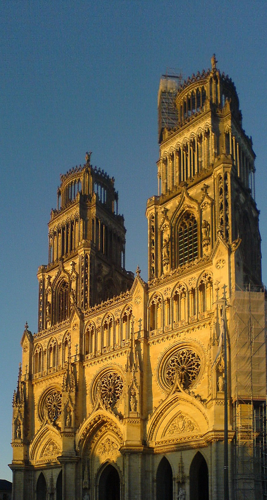 Cathédrale Ste-Croix, Orléans